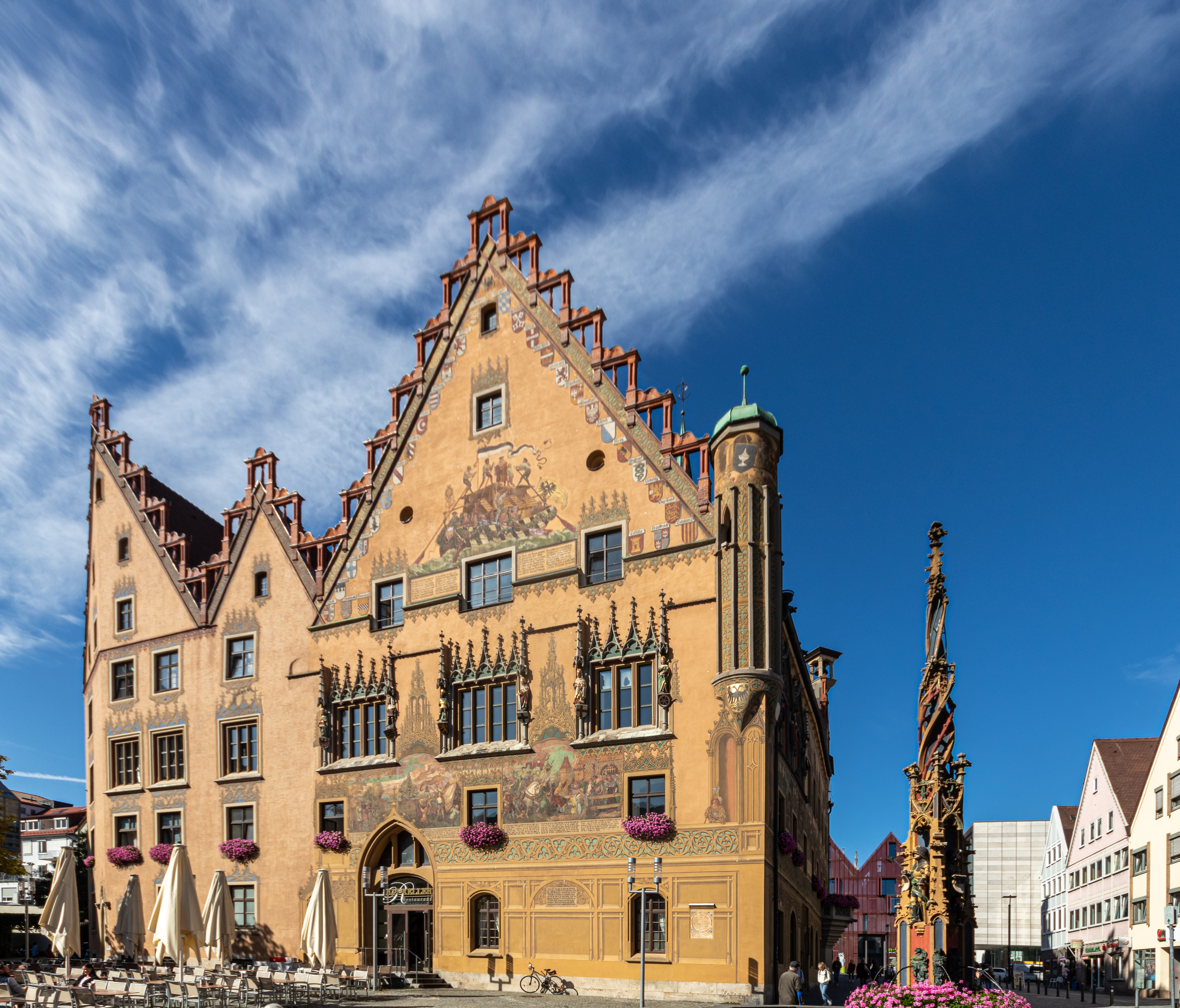 Rathaus Ulm